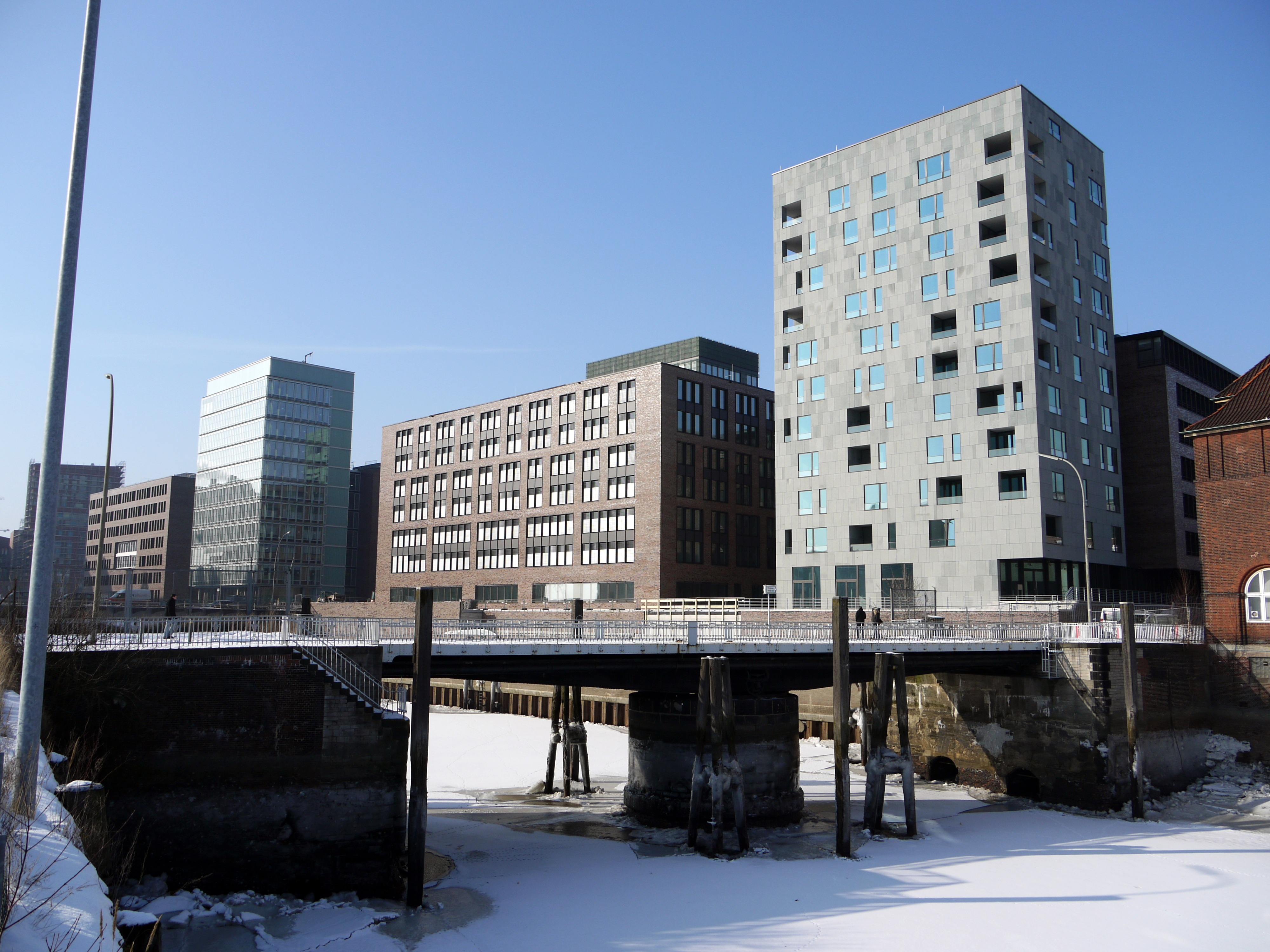 Bebauung des Brooktorkais in der HafenCity in Hamburg.